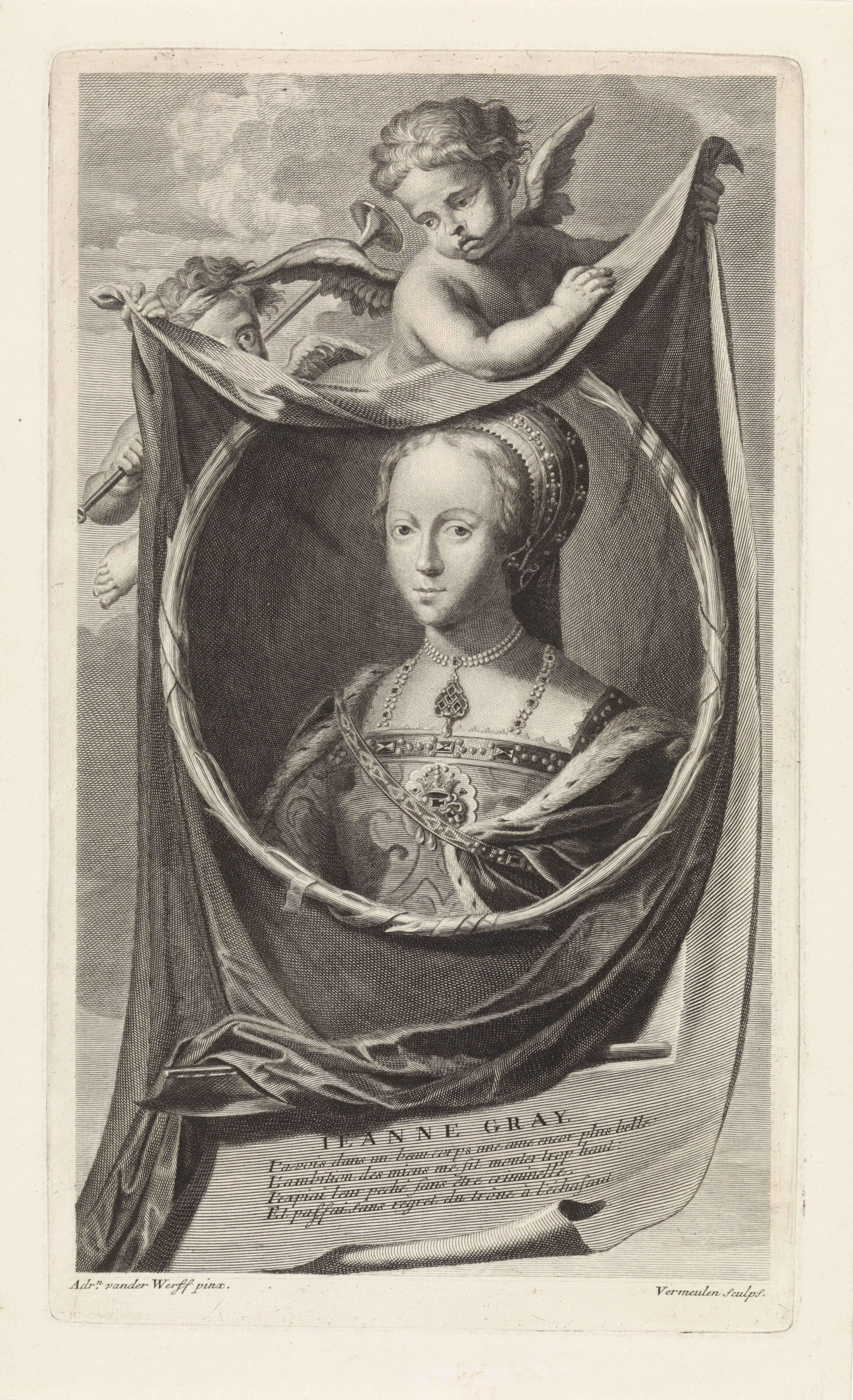 IdentificatieTitel(s): Portret van lady Jane GreyElf portretten uit de Engelse geschiedenis (serietitel)Objecttype: prent Objectnummer: RP-P-OB-15.681Catalogusreferentie: Hollstein Dutch 210-2(2)Opschriften / Merken: verzamelaarsmerk, verso, gestempeld: Lugt 2228Omschrijving: Portret van lady Jane Grey, in een ovaal dat wordt vastgheouden door twee huilende putti. Onder het portret een bijl verwijzend naar haar executie.VervaardigingVervaardiger: prentmaker: Cornelis Martinus Vermeulen (vermeld op object)naar schilderij van: Adriaen van der Werff (vermeld op object)Plaats vervaardiging: AntwerpenDatering: 1697Fysieke kenmerken: gravureMateriaal: papier Techniek: graveren (drukprocedé)Afmetingen: plaatrand: h 315 mm × b 185 mmToelichtingPrent ook gebruikt als boekillustratie in: Larrey, Isaac de. Histoire d'Angleterre, d'Ecosse, et d'Irlande. 4 dln. Rotterdam: Reinier Leers, 1697-1713.OnderwerpWat: cupids: 'amores', 'amoretti', 'putti'Wie: Lady Jane GreyVerwerving en rechtenVerwerving: onbekend 1991Copyright: Publiek domein